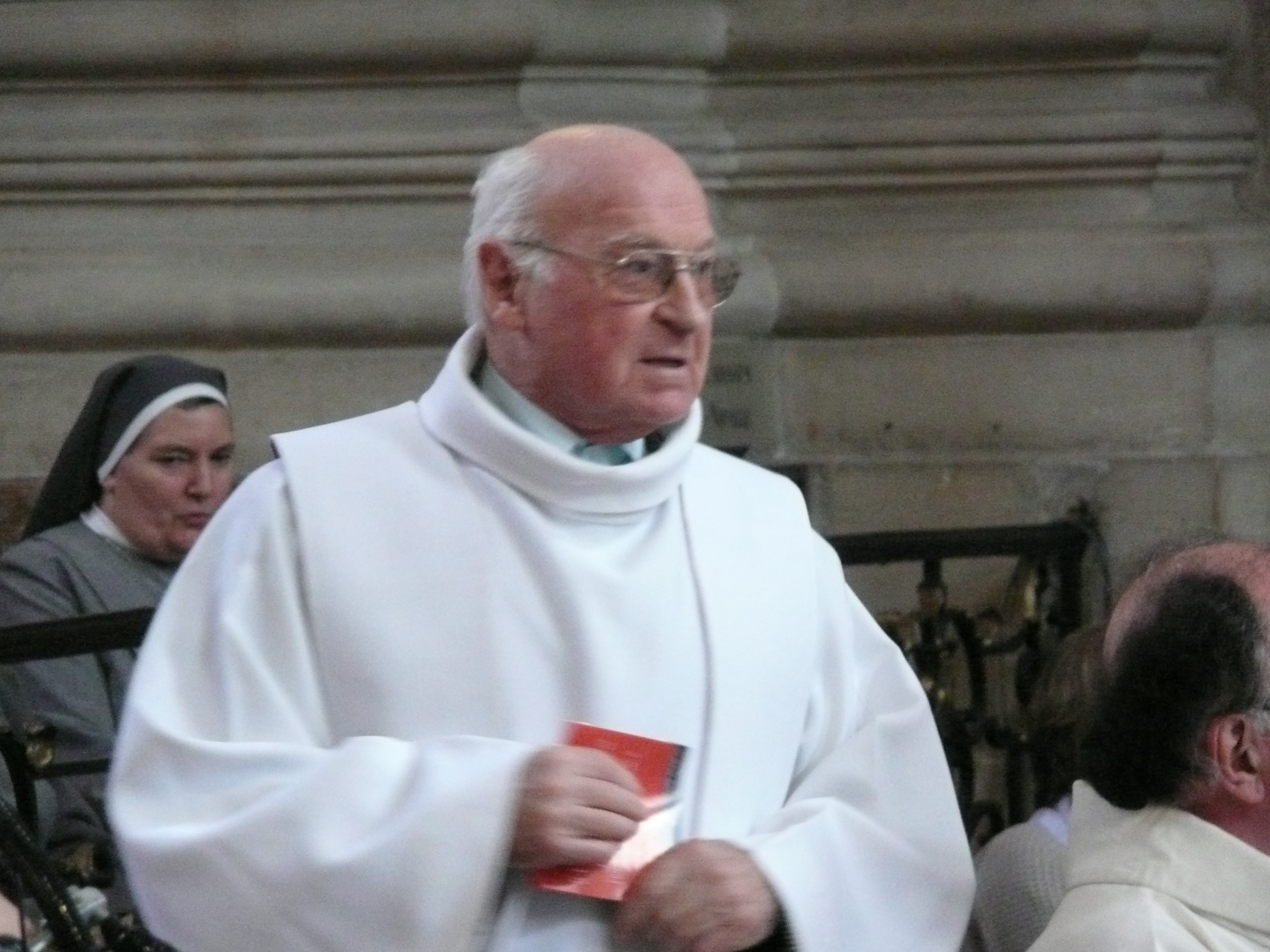 Abbé André Houot lors d'une ordination à la cathédrale de Nancy en 2011